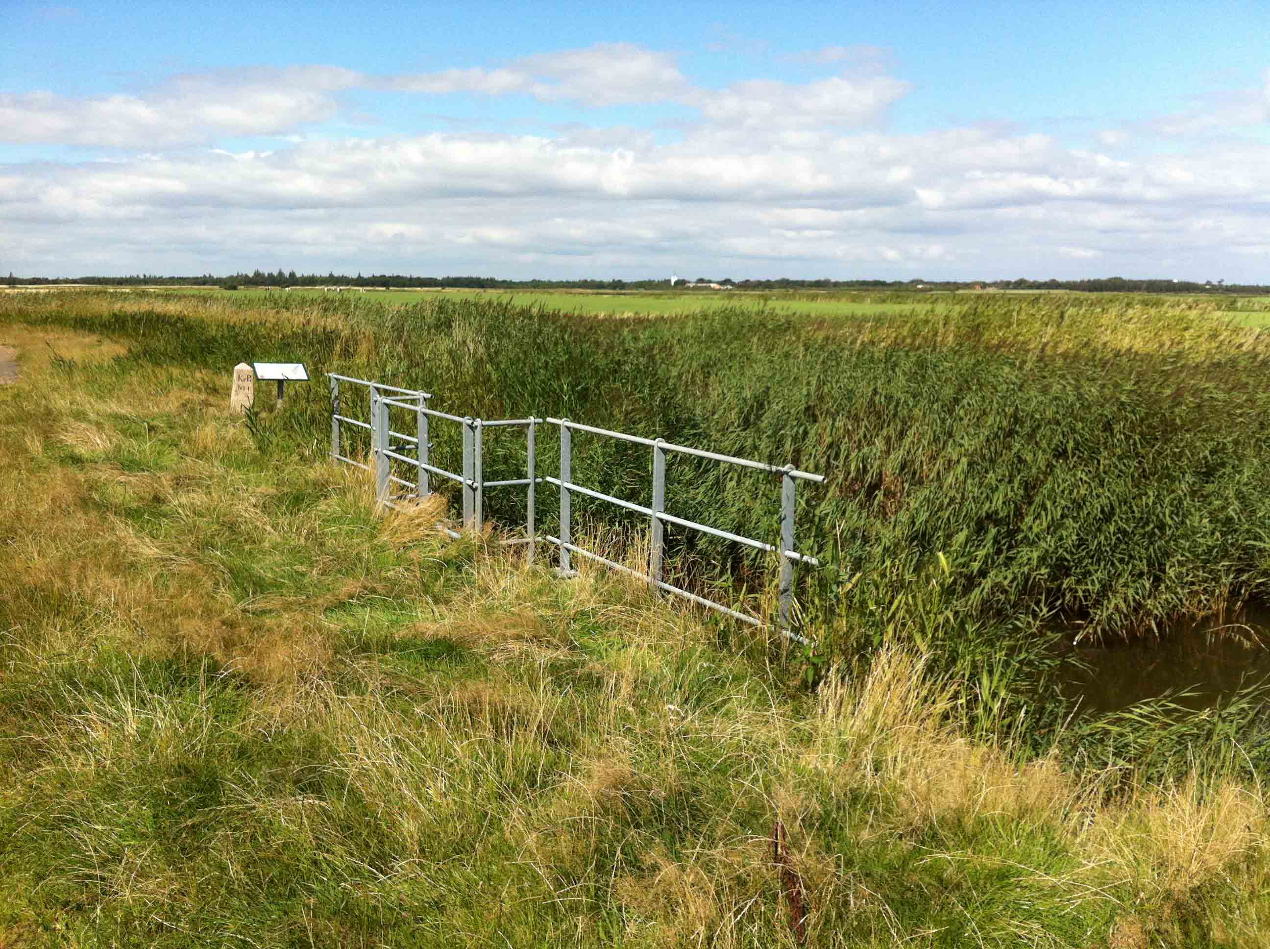 Grænsesten Nr. 1 ved Grænsegrøften syd for Vester Vedsted. Tysk inskription på sydsiden: "KrPr" (Königreich Preussen)